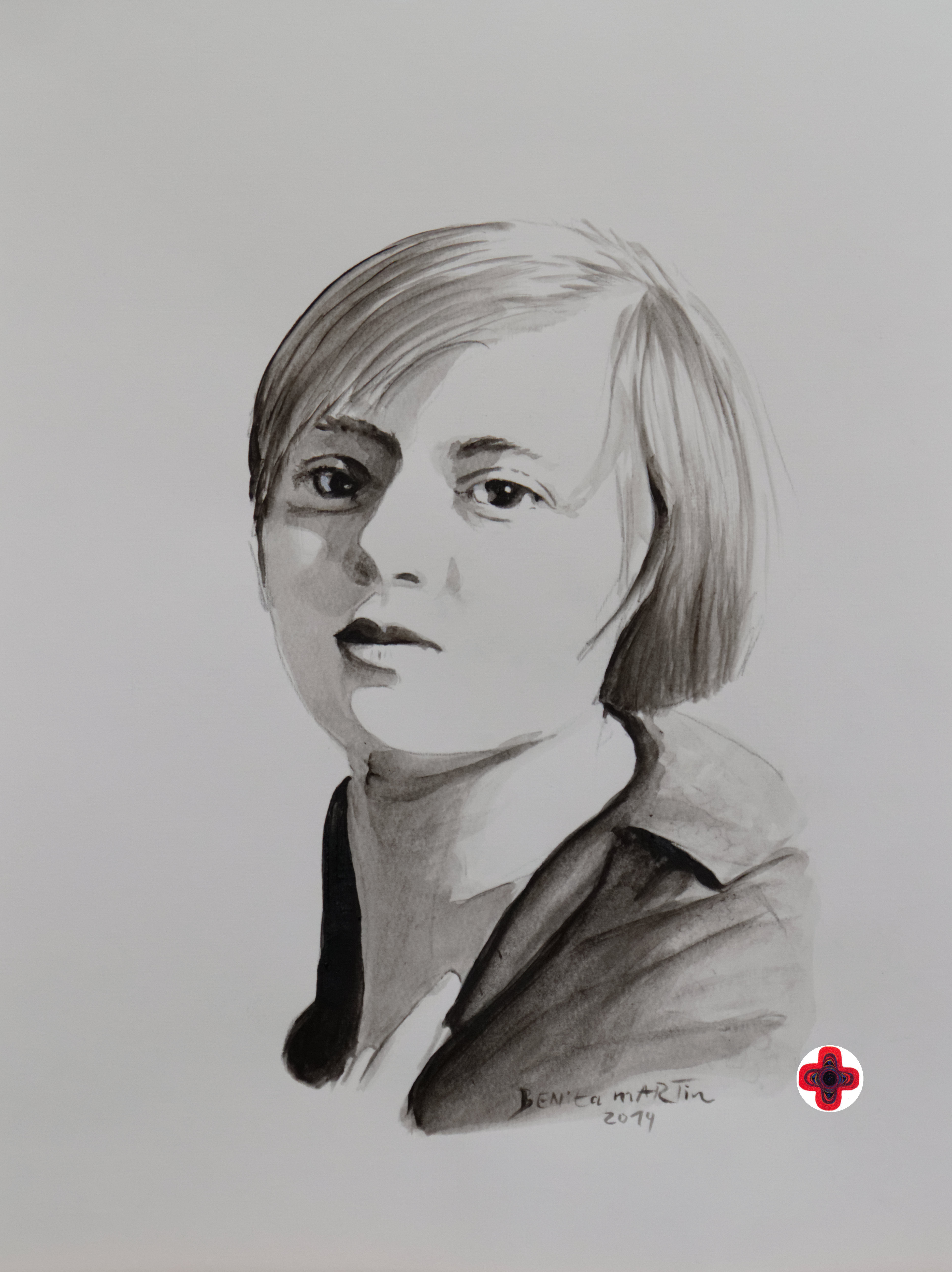 Portät Zeichnung, Kohle, Acryl, Graphit, Benita Martin, ADA Dimensionsmalerei®